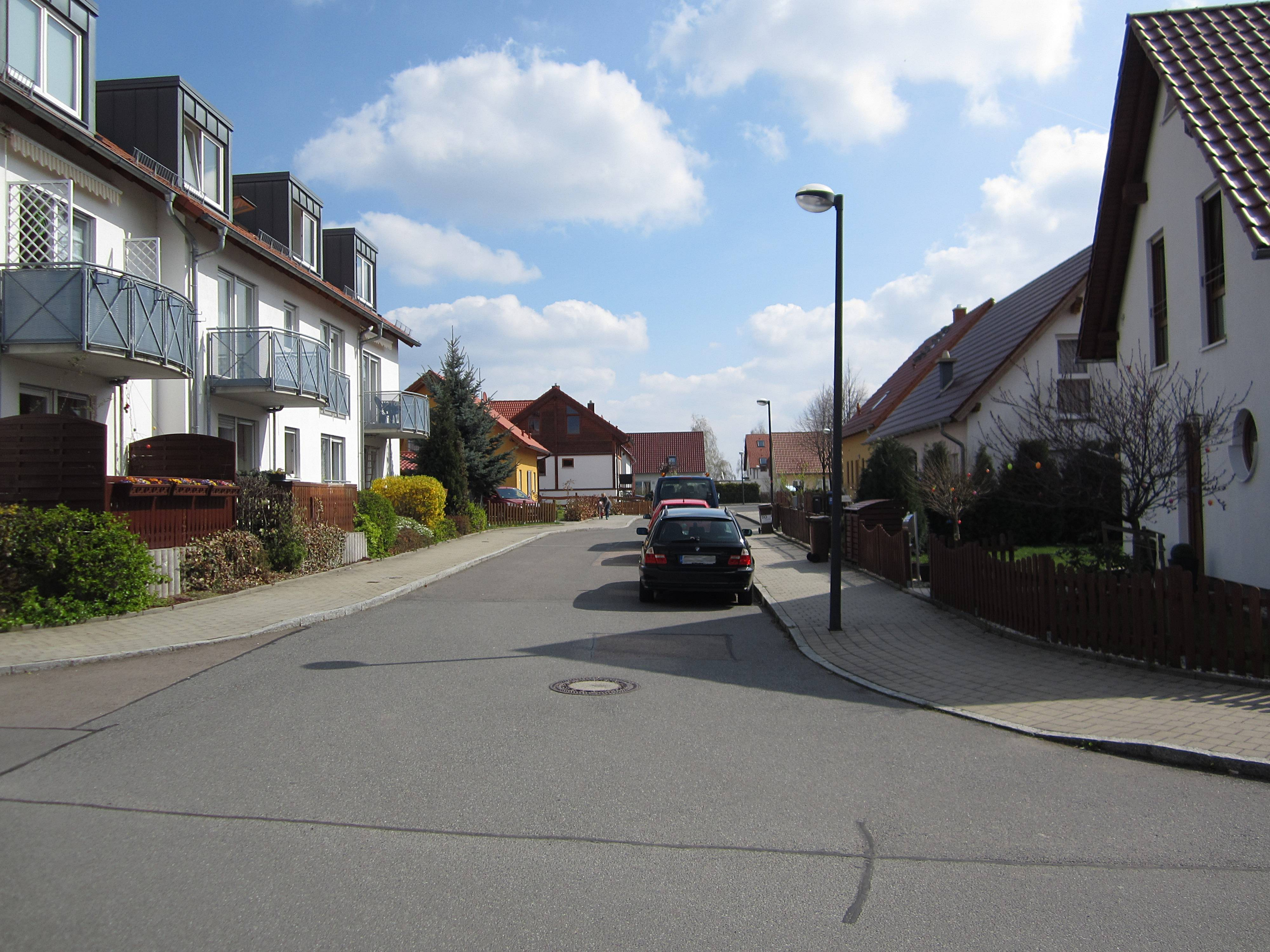 Neubausiedlung Neuburgstädtel